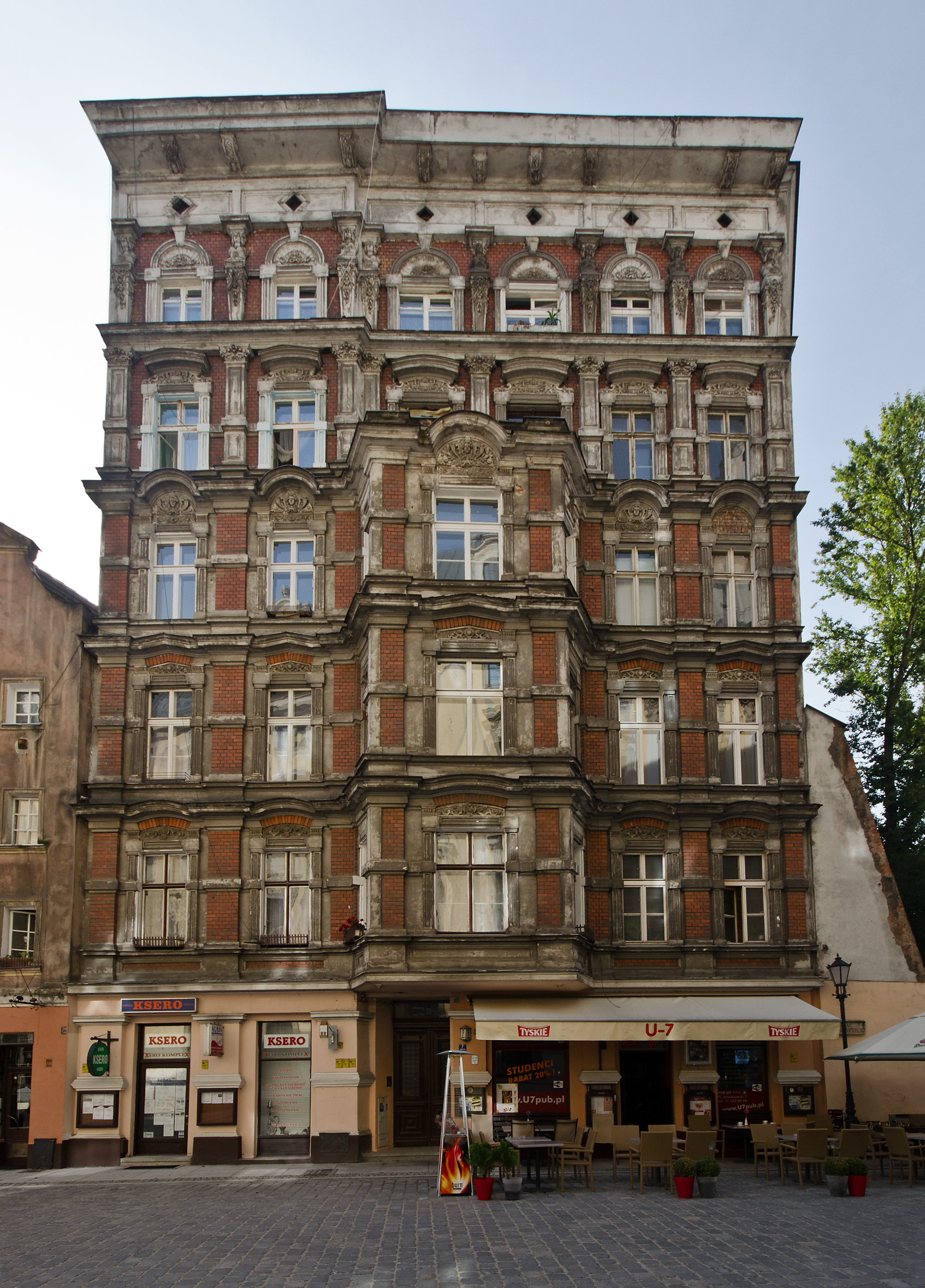 Kamienica pl. Uniwersytecki 7, Miasto Wrocław - Stare Miasto